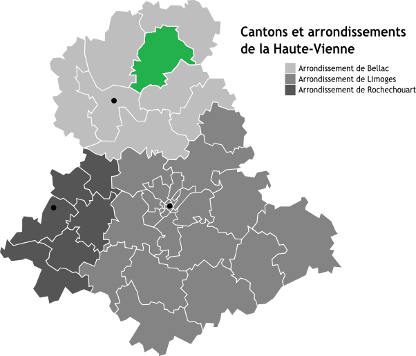 Canton de Magnac-Laval, Limousin, France en Carte des arrondissements de la Haute-Vienne